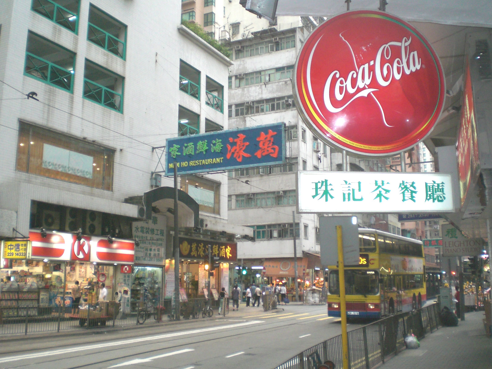 茶餐廳 酒樓 OK便利店 吉席街